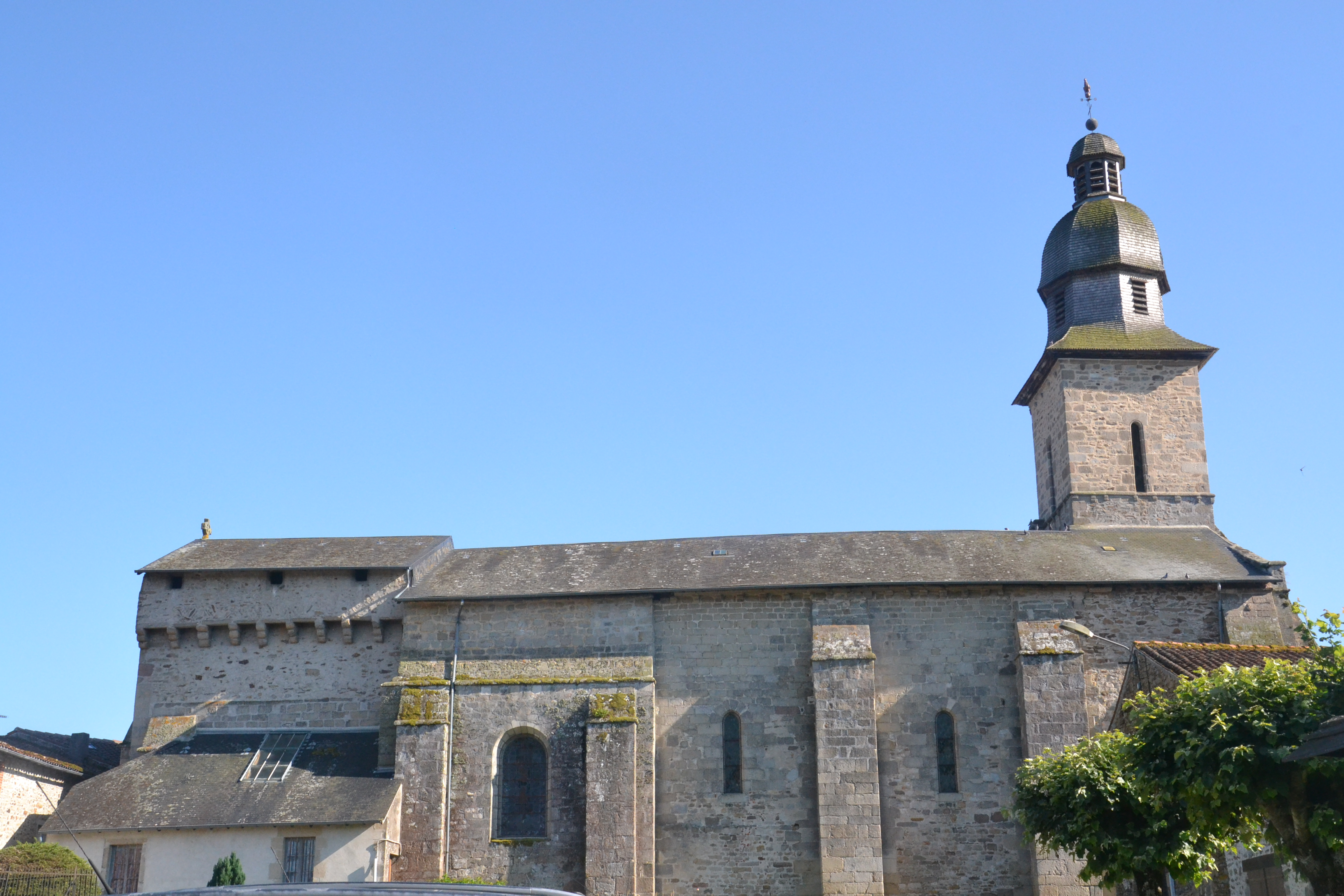 L'église de Rancon (Haute-Vienne, France)